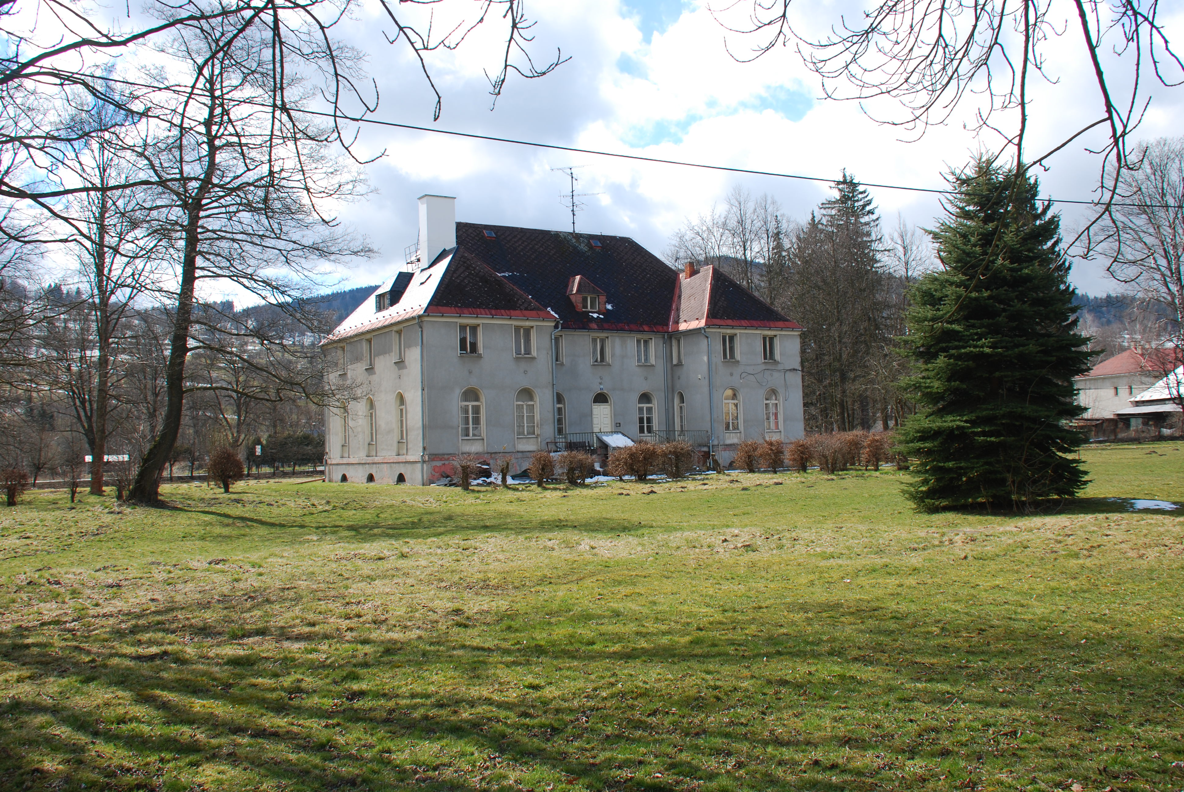 Vila čp. 298, Vrbno pod Pradědem.